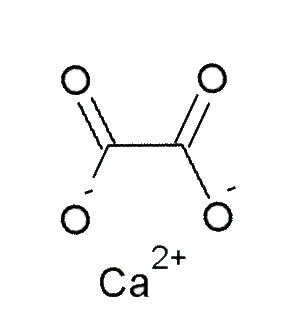 structure formula of calcium oxalate